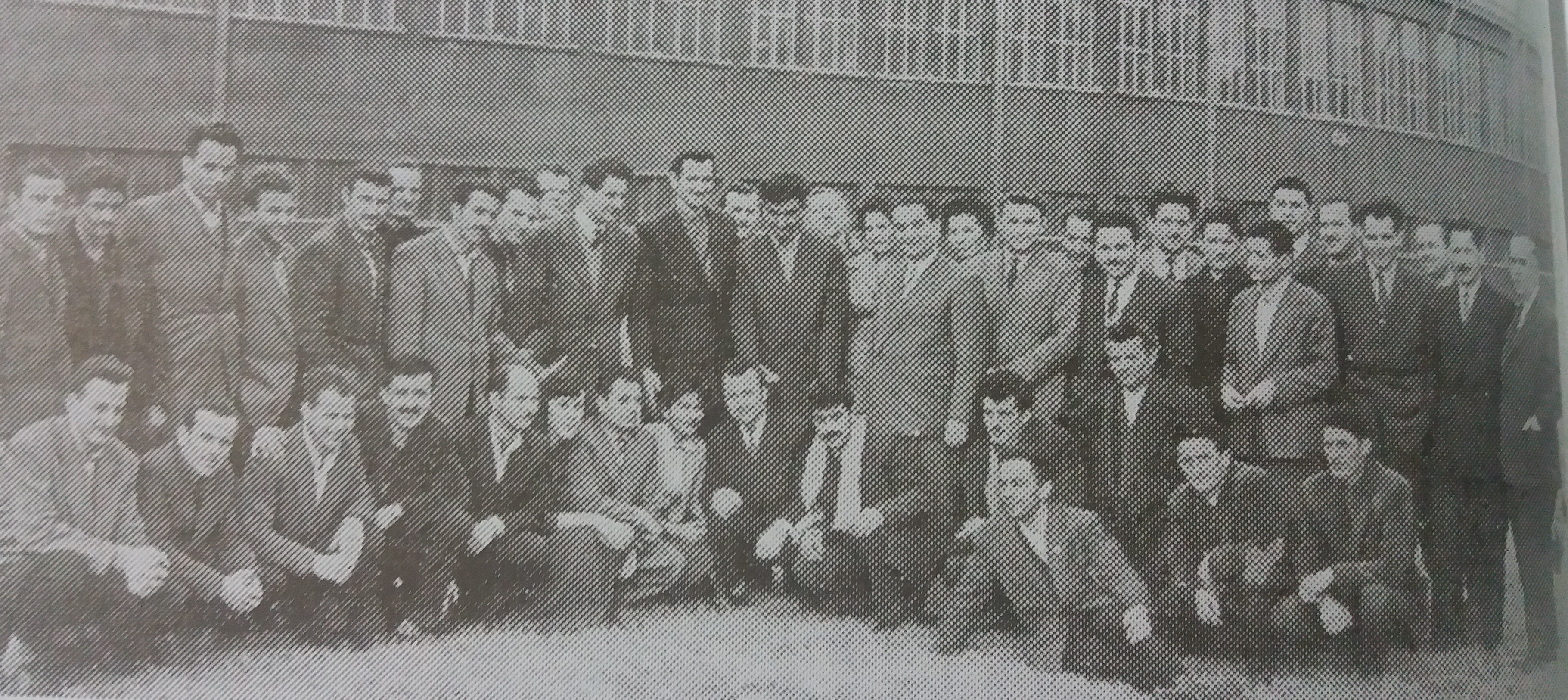 Srpskohrvatski / српскохрватски: Radnički savet Magnohroma 1959.